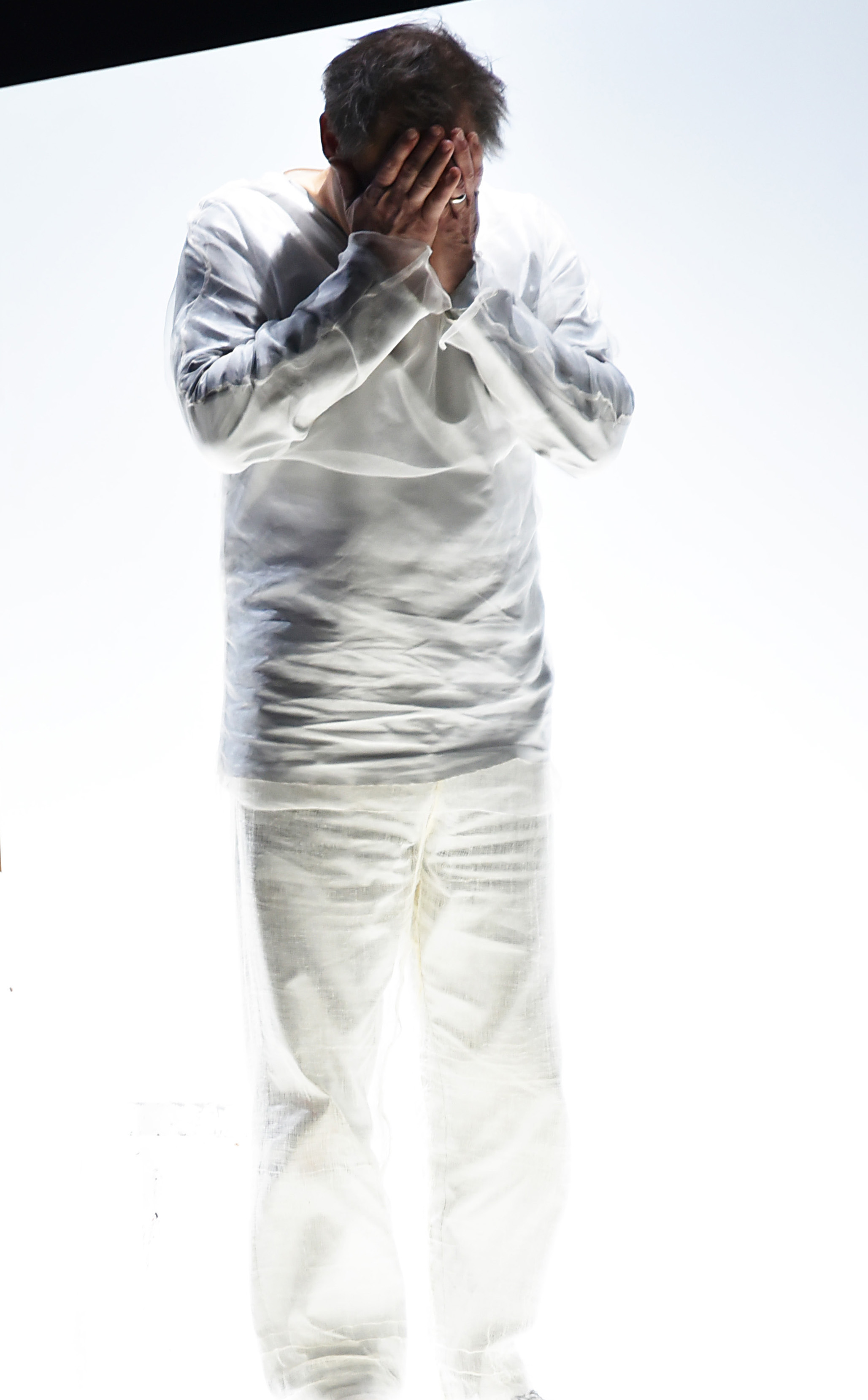 Lohengrin, von Elsa befragt. Oper Oslo, 2015 (Lohengrin: Paul Groves; Regie: Johannes Erath, Kostüme: Christian Lacroix)